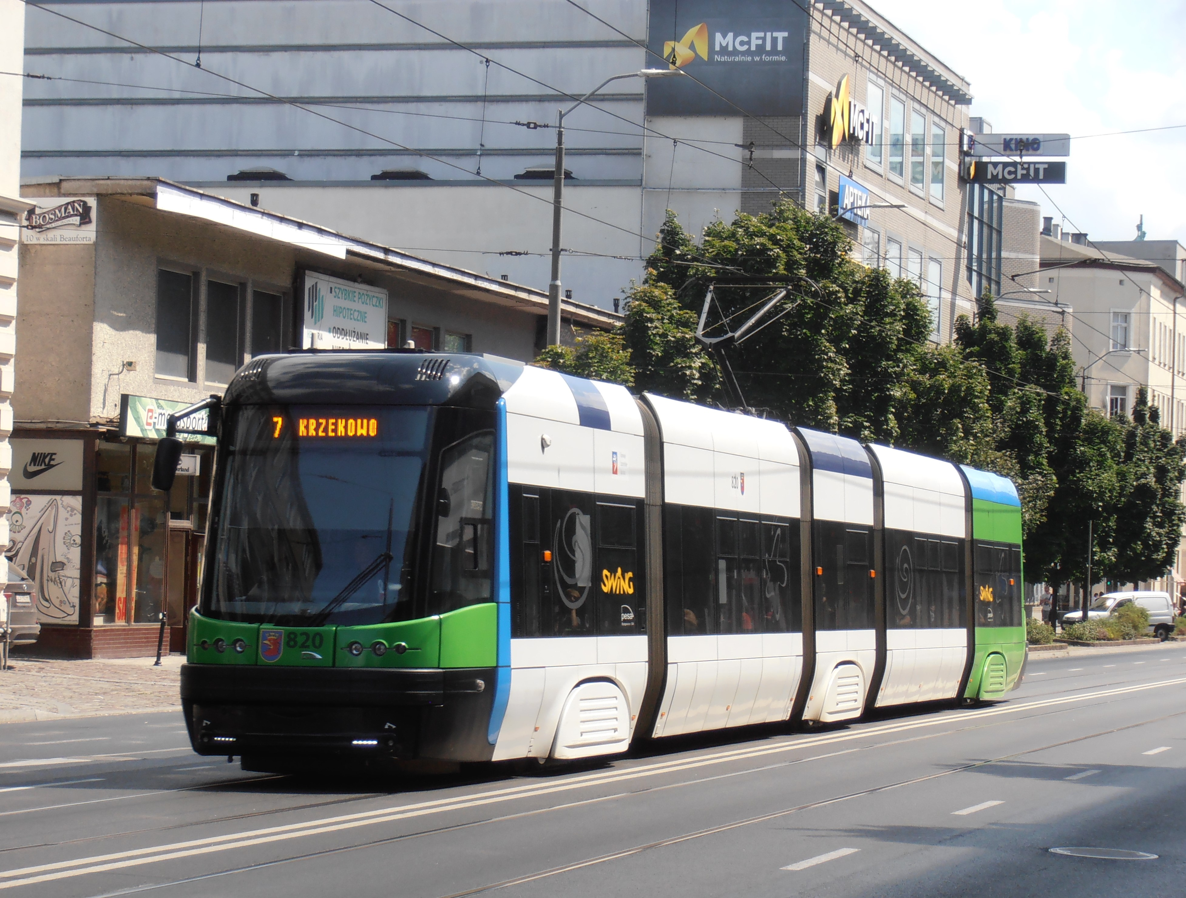 Tramwaje typu Pesa Swing na ul. Krzywoustego w Szczecinie.